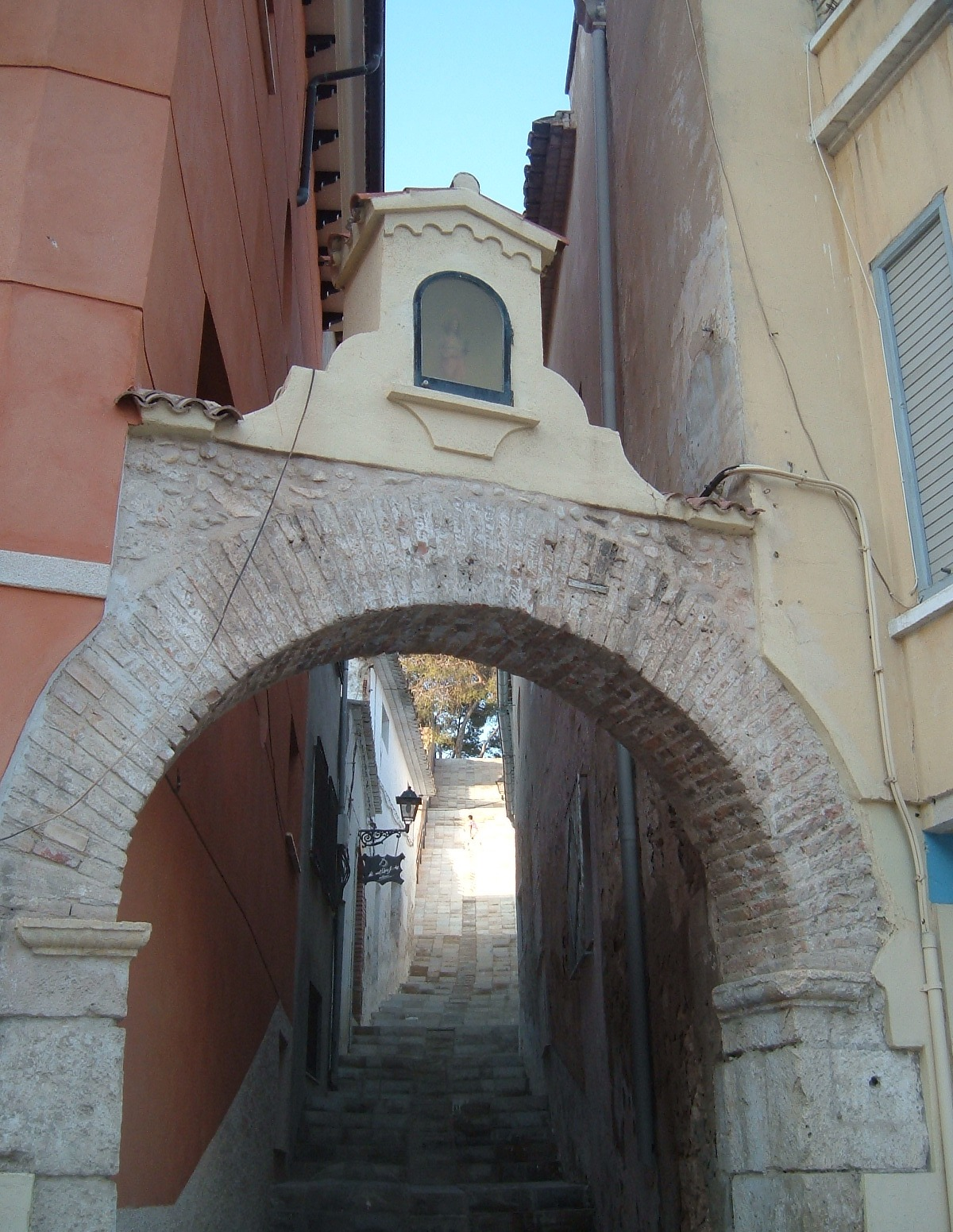 Subida de Santa Bárbara, típica calle del casco antiguo villenense